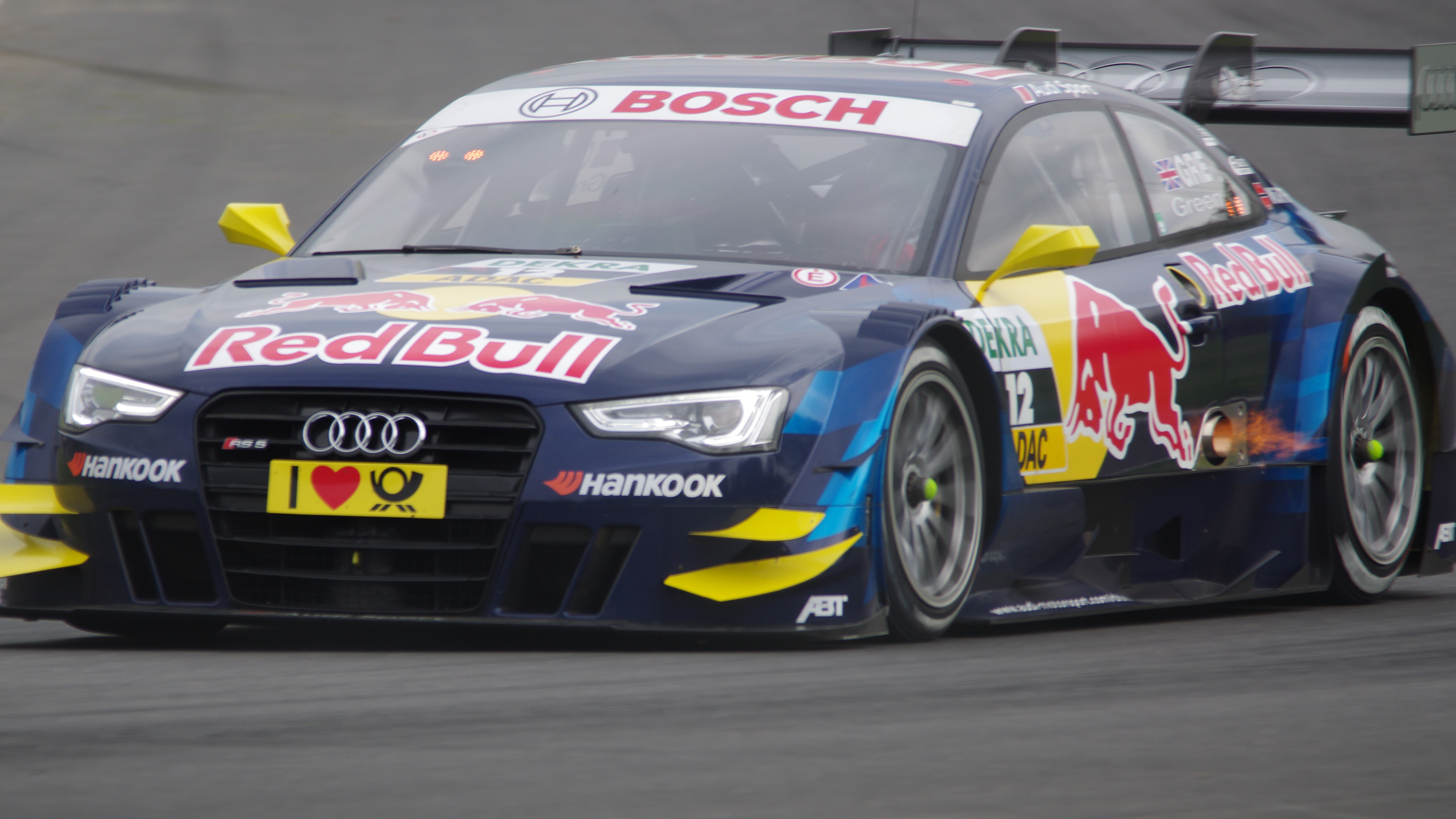 DTM Brands Hatch 2013 - #12 Jamie Green (GBR), Audi RS5 DTM